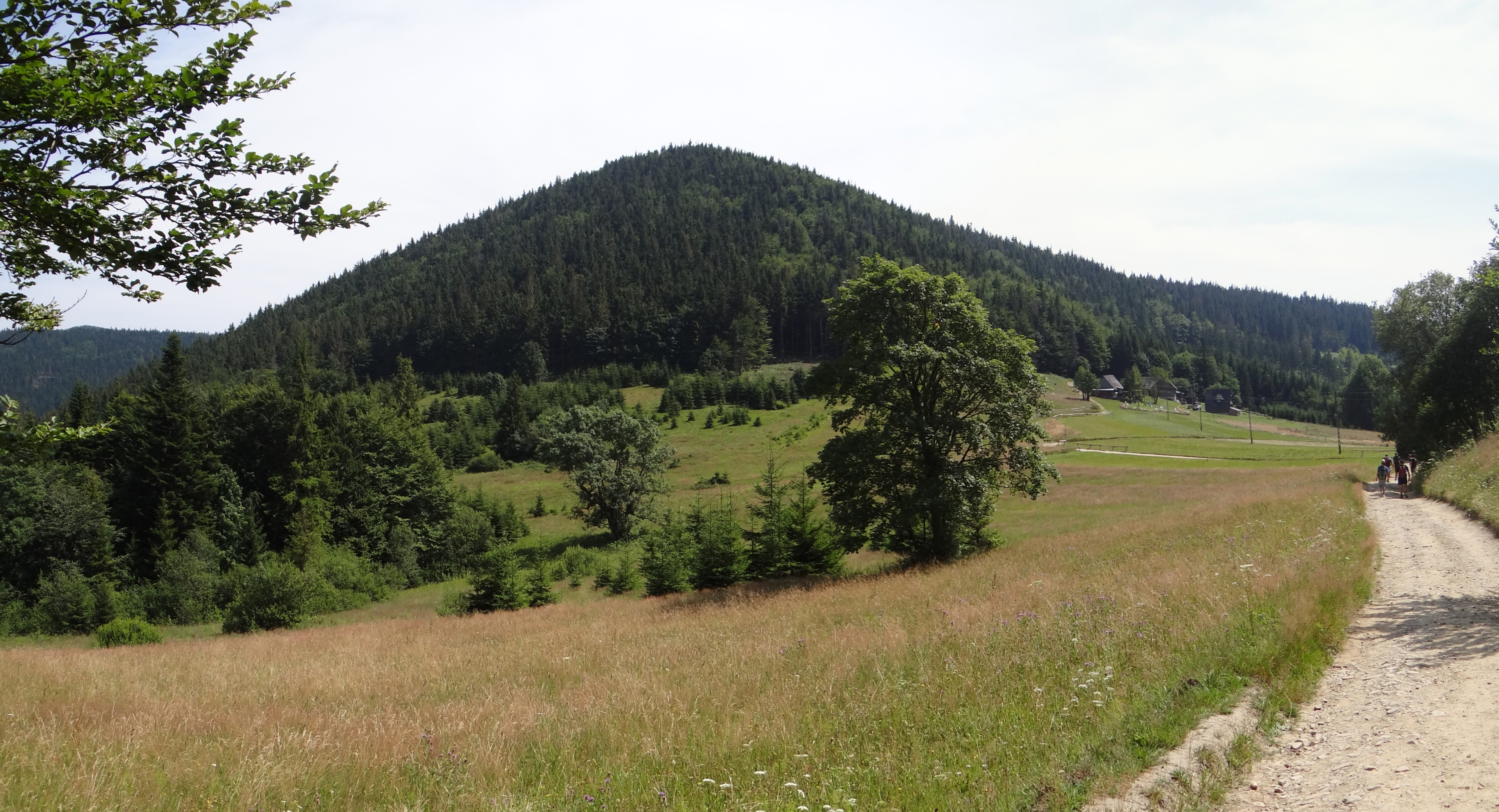 Przełęcz Przebigek i wznosząca się nad nią zalesiona Bania